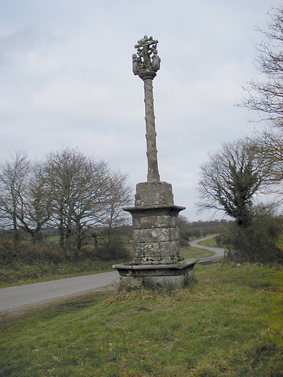 Croix représentant le calvaire. Elle se situe dans les Côtes D'Armor en Bretagne.